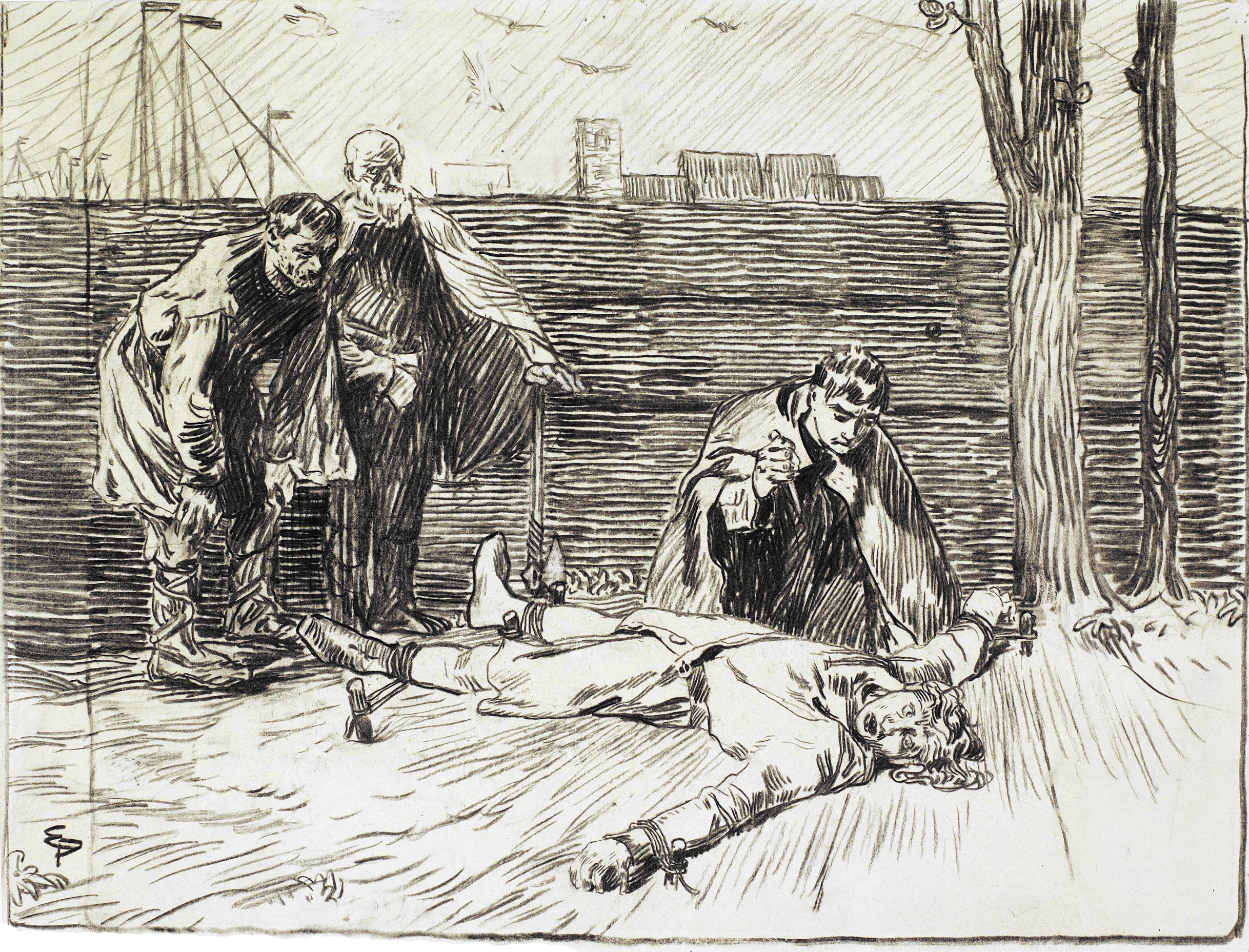 Eilif Peterssen: Illustration for Magnus Blindes og Harald Gilles saga, Heimskringla 1899-edition. nn: «Magnus vert skamfaren.»